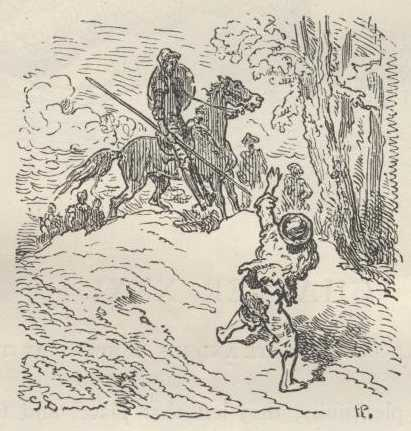 Gustave Doré, ilustração para "Dom Quixote" de Miguel de Cervantes